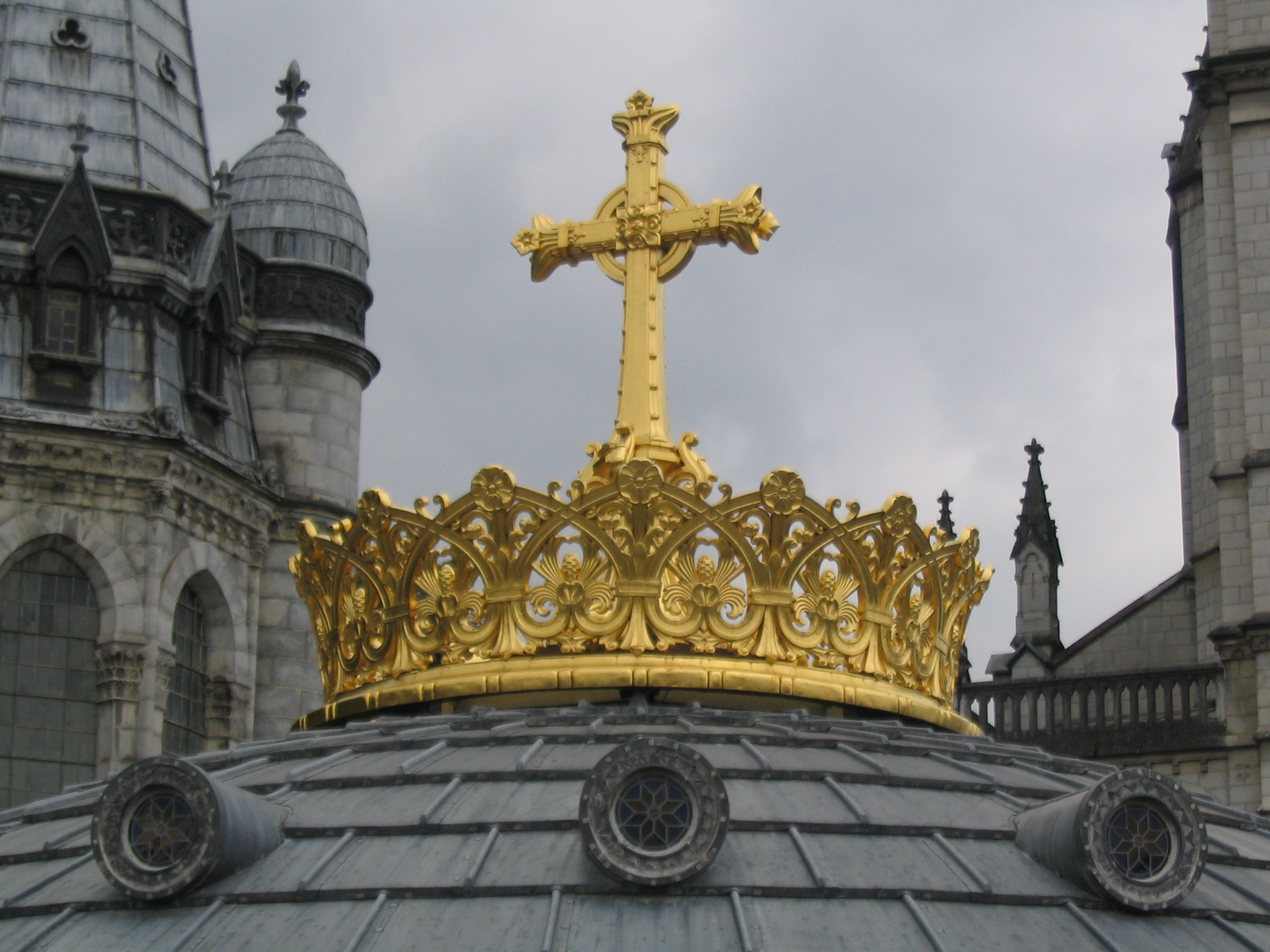 Lourdes